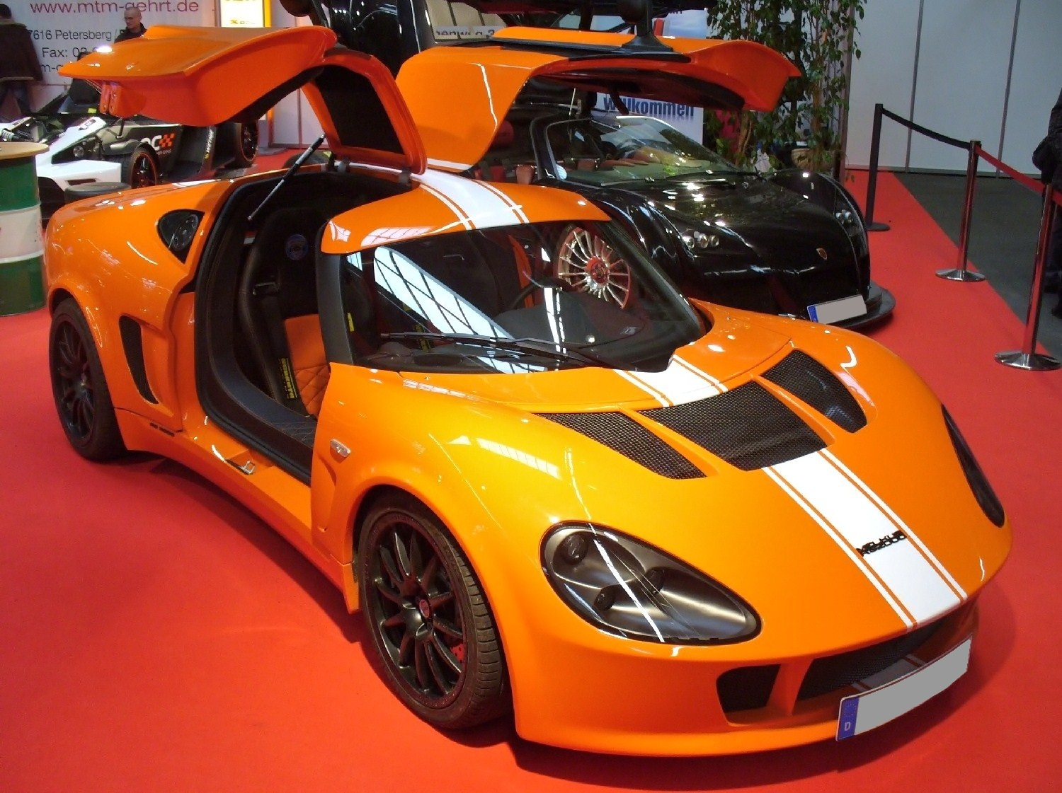 Melkus RS2000